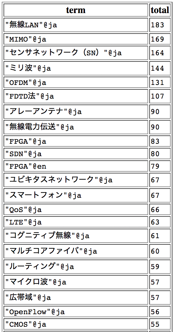 2014年における主要な研究トピック